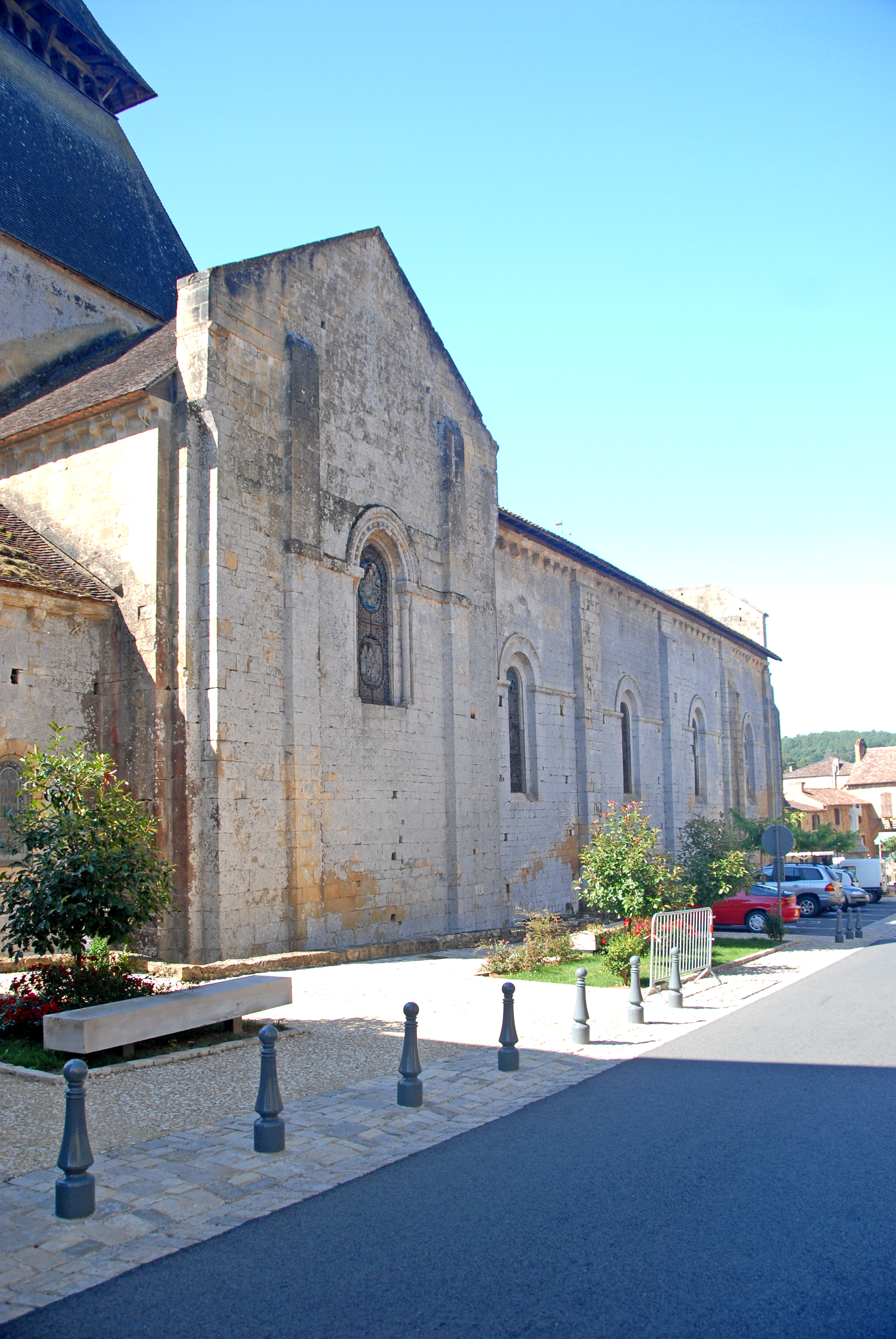 Cadouin, Lang- u. Querhaus von NO